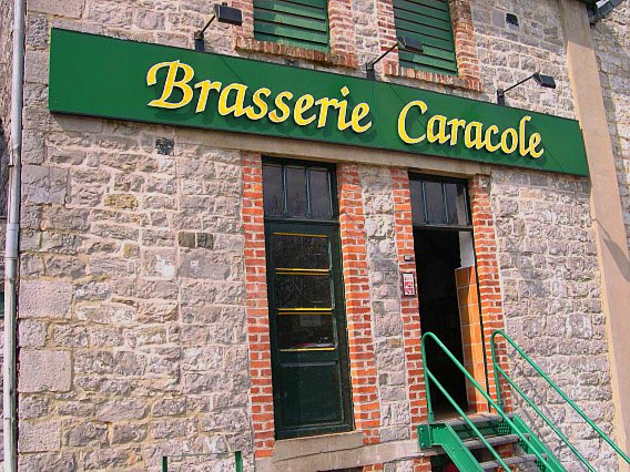 C'est à 8 km de Dinant que le village de Falmignoul accueille la Brasserie Caracole, on y produit des bières artisanales depuis 1992.